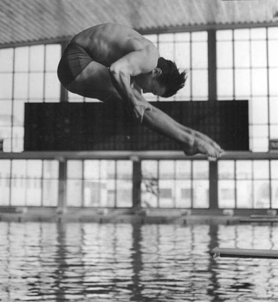 Rolf Sperling Zentralbild Kluge 25.2.1968 Berlin: DDR-Hallenmeisterschaften der Wasserspringer Der mehrfache deutsche Meister der DDR, Rolf Sperling (TSC Berlin), holte sich am 25.2.1968 in der Schwimmhalle des Berliner Sportforums den titel bei den Hallenmeisterschaften im Kunstspringen vom 1-m-Brett.